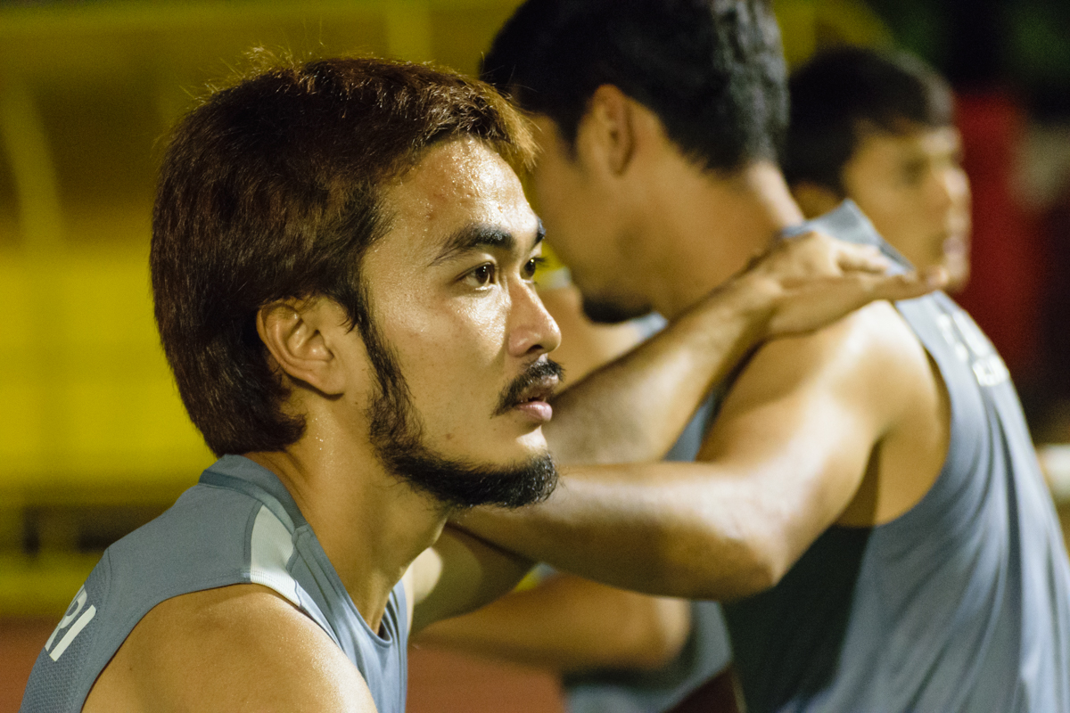 Teerapong Deehamhae